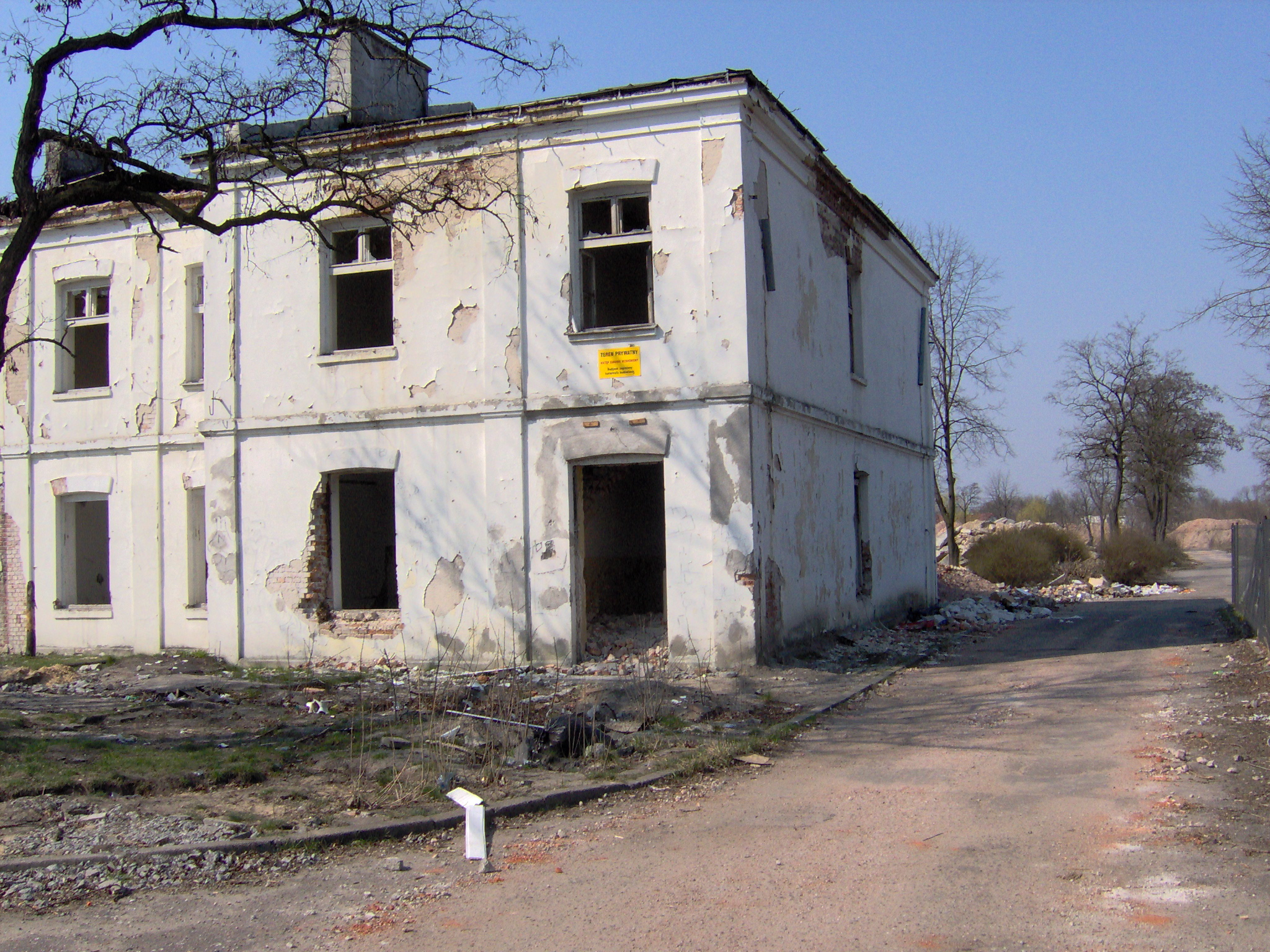 Pozostałości po byłej jednostki wojskowej przy ul. Żytniej 83 (2007 r.)